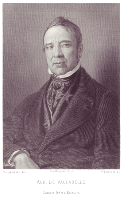 Portrait_d'Achille_de_Vaulabelle.jpg